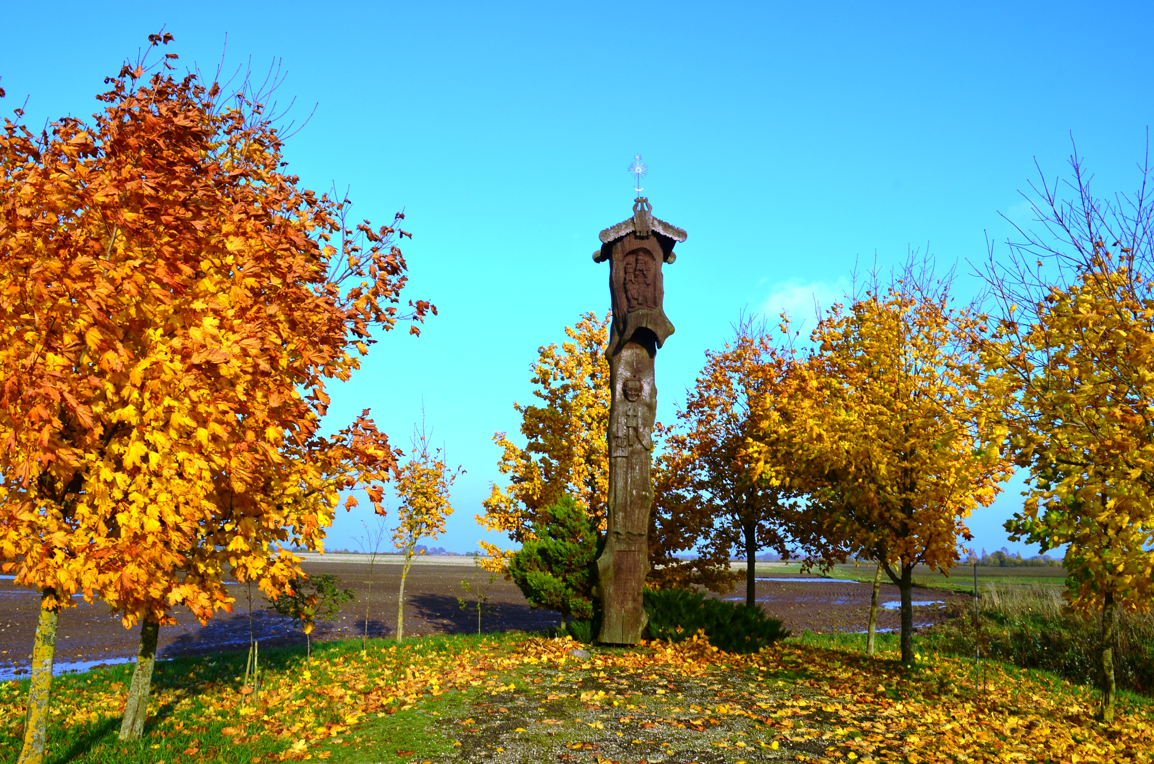 Paminklas A. Dambrauskui-Jakštui, Kuronys, Kėdainių raj.